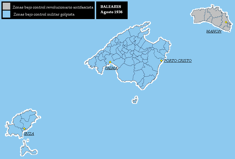 Baleares antes del inicio del desembarco en agosto de 1936 Imagen realizada por User:KillOrDie. Situación de las Islas Baleares previa a la operación del desembarco de Mallorca de agosto-septiembre de 1936